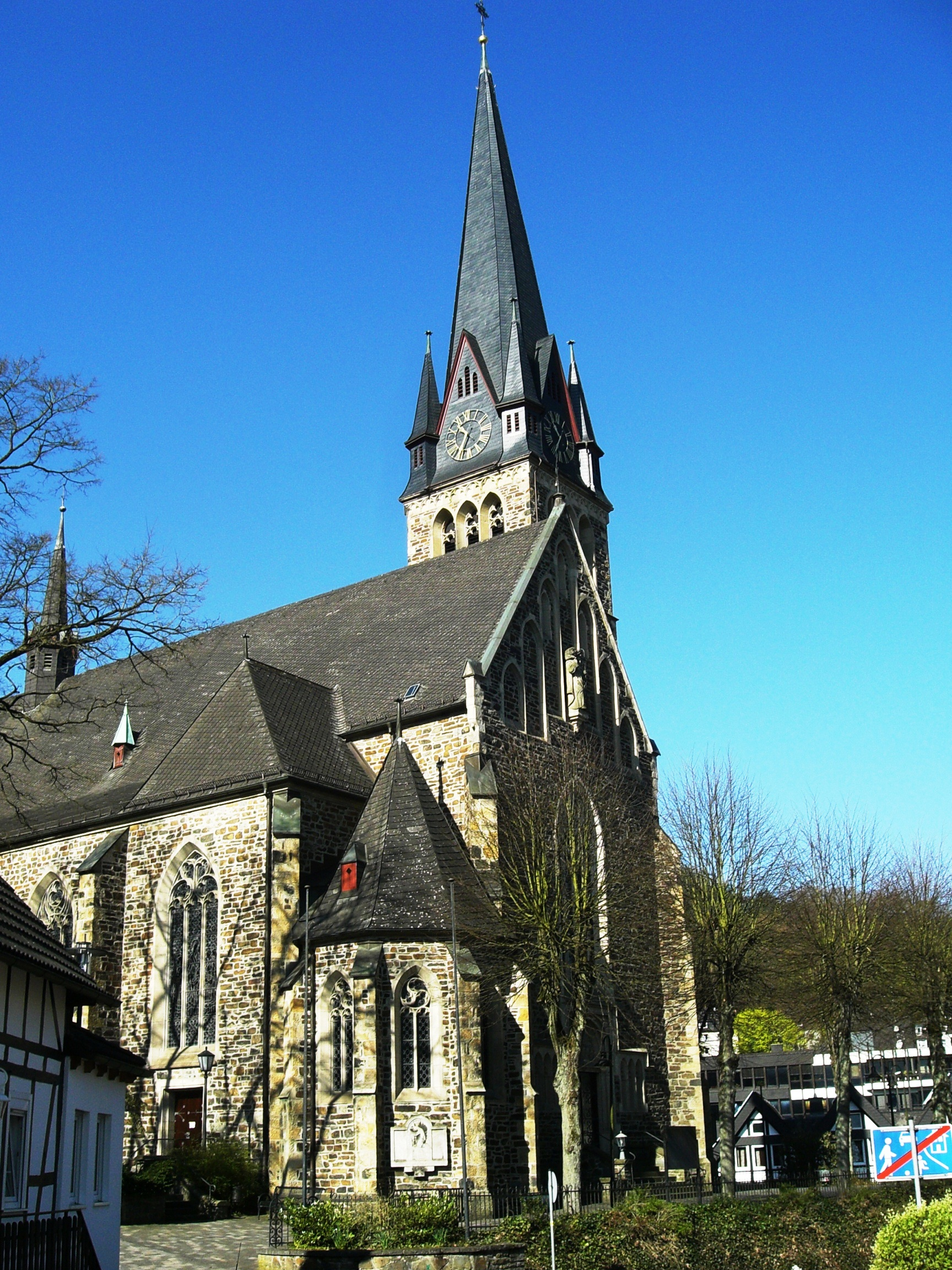 Unter Denkmalschutz stehende Kirche St. Agatha in Altenhundem